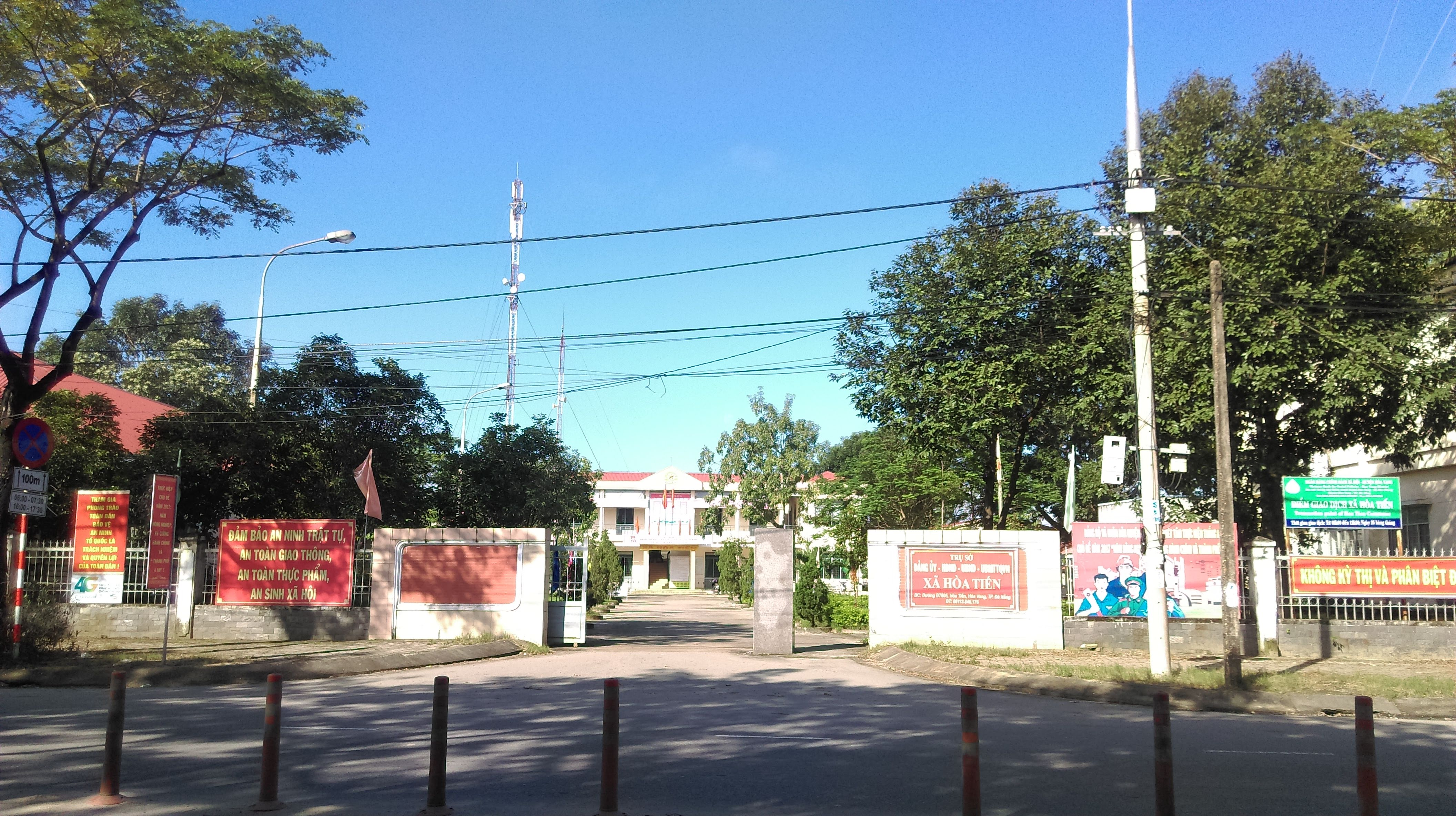 UBND xã Hòa Tiến, Hòa Vang, Đà Nẵng